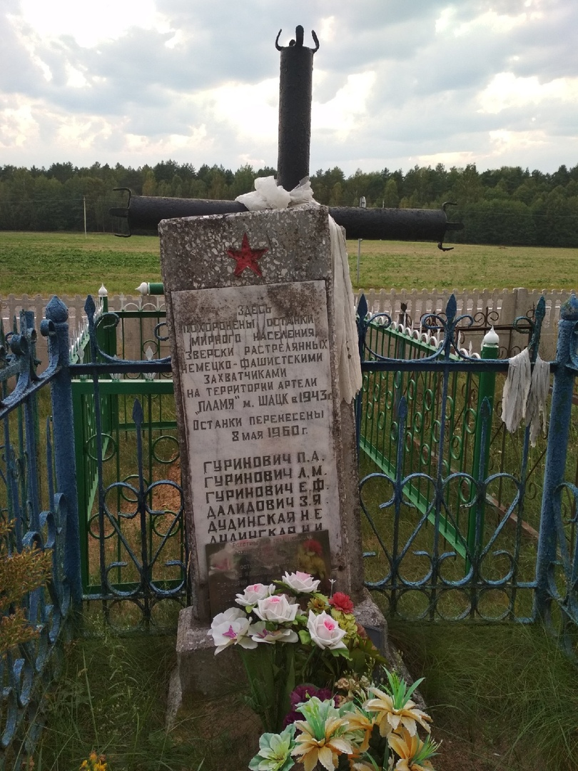 Могілкі